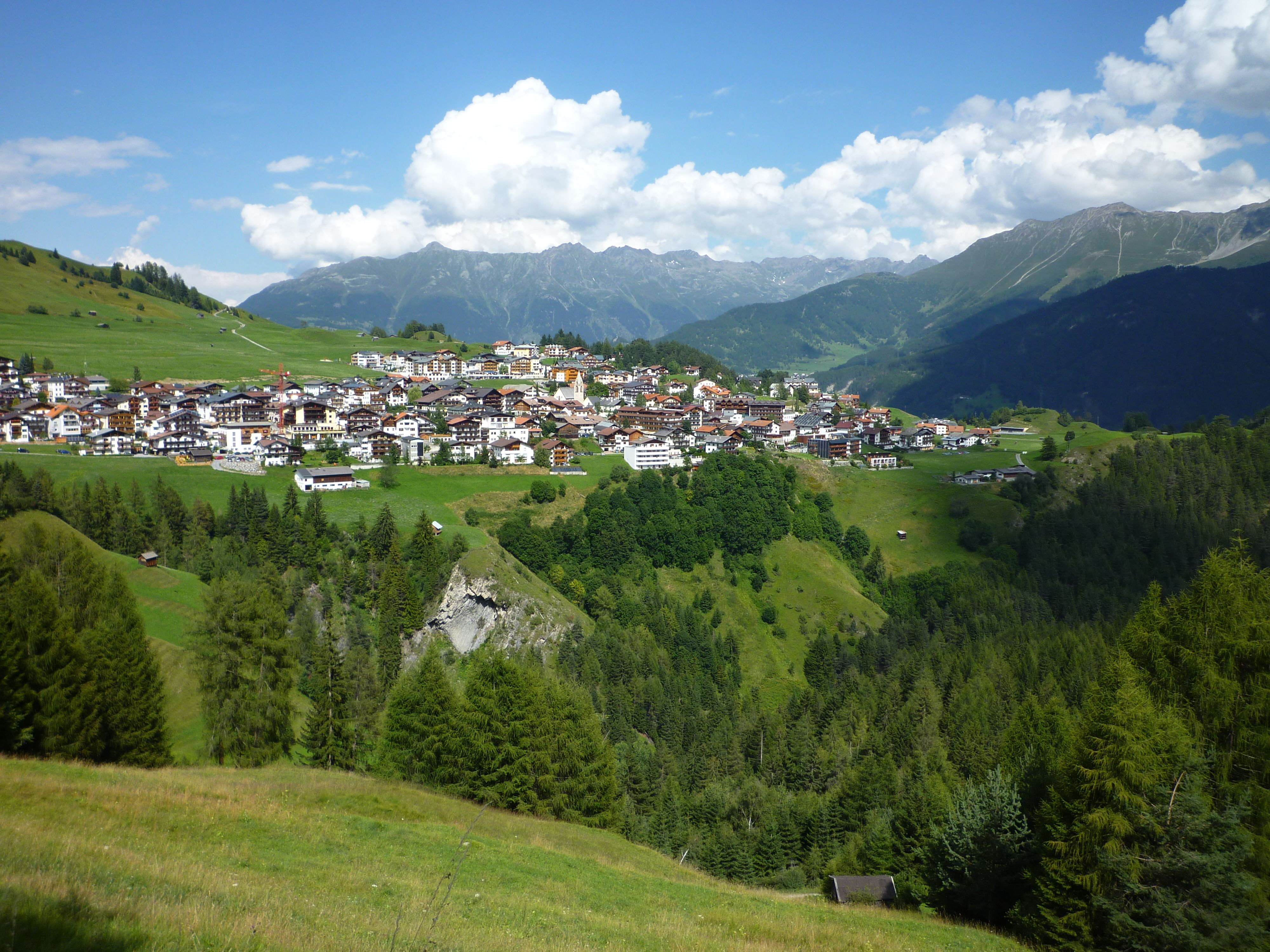 Serfaus - Ortsbild auf dem Sonnenplateau 1429 Hm